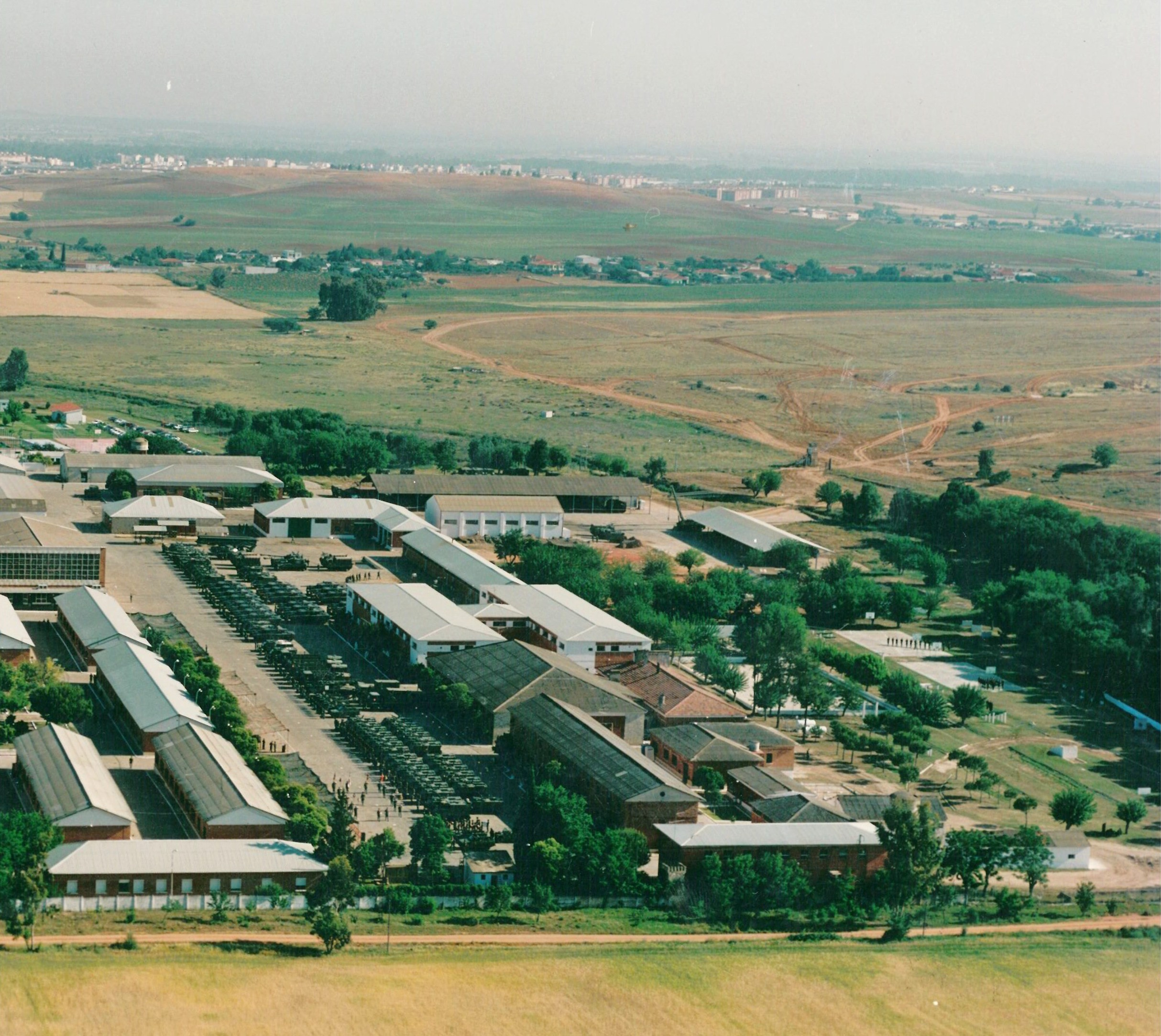 Vista aerea de la Base General Menacho-Botoa-Badajoz.